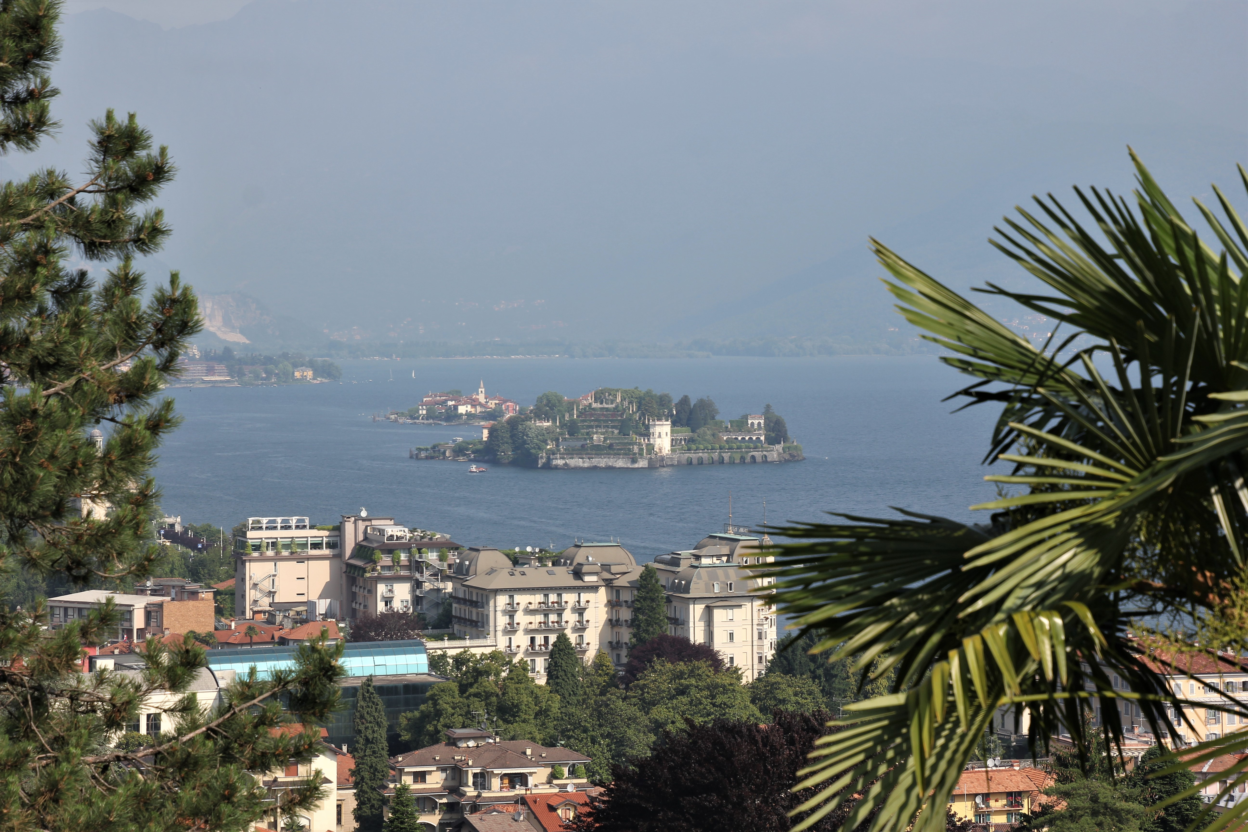 Stresa, panorama